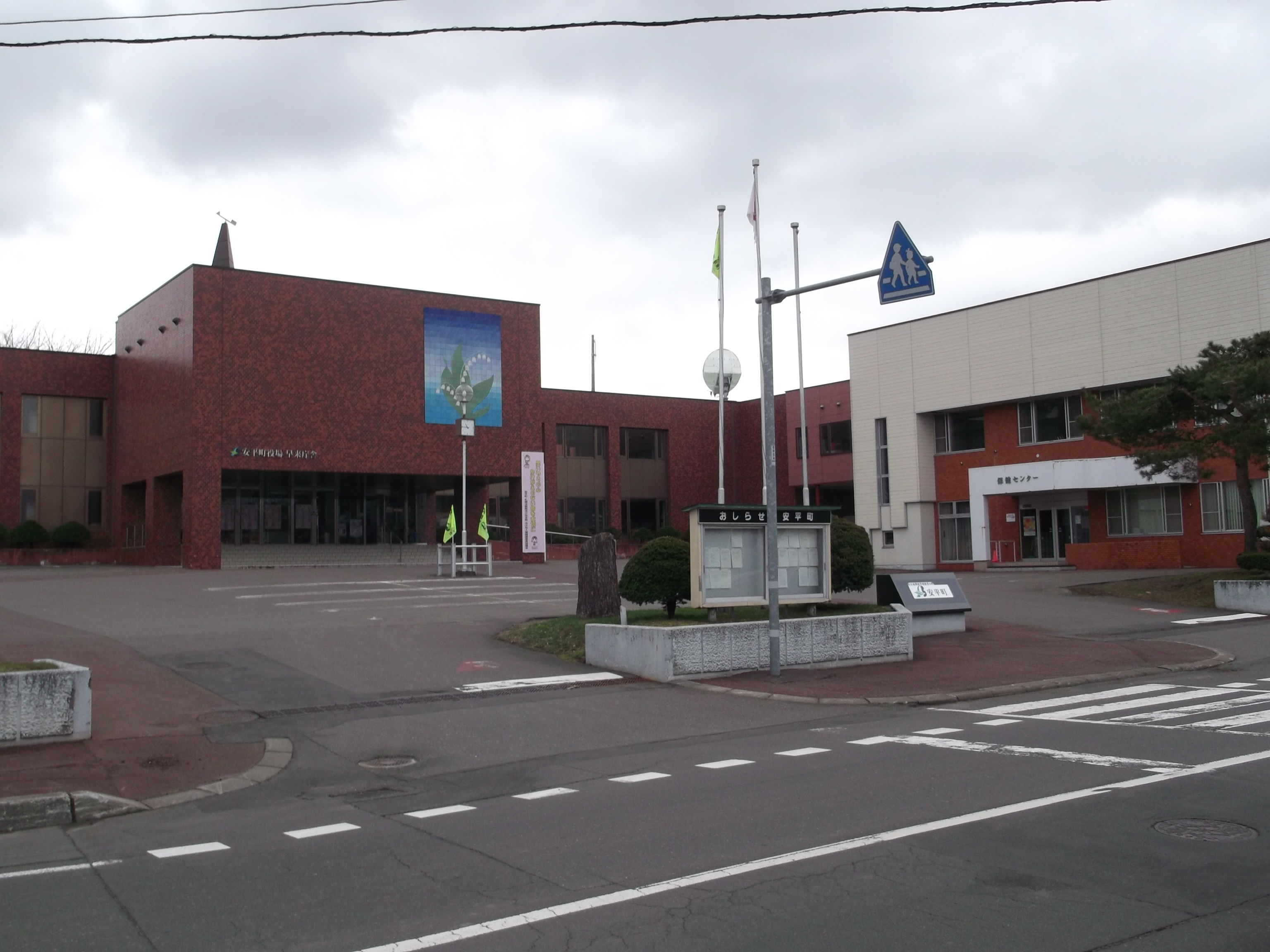 北海道安平町役場